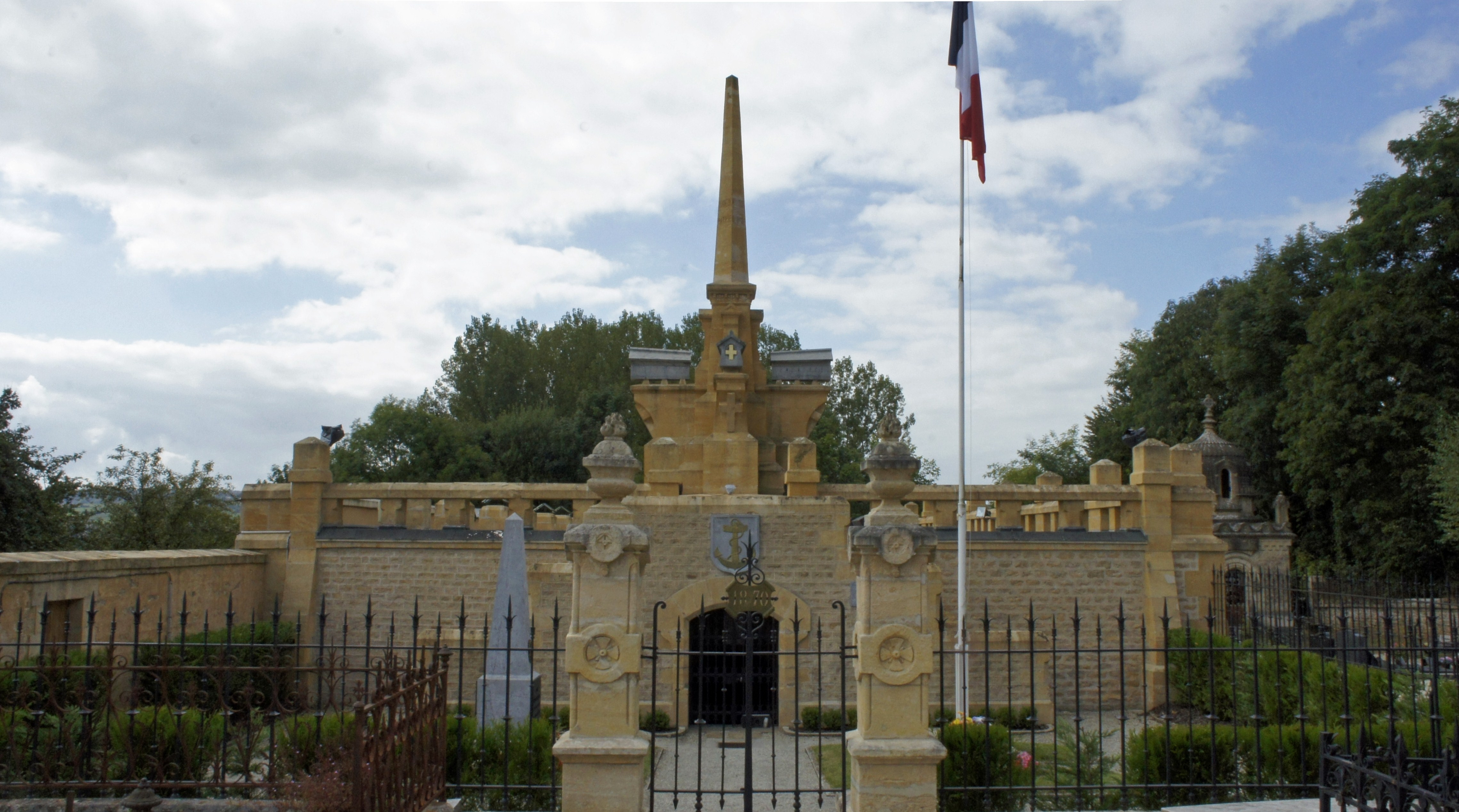 Monument_de_la_crypte_, hommage aux morts de 1870